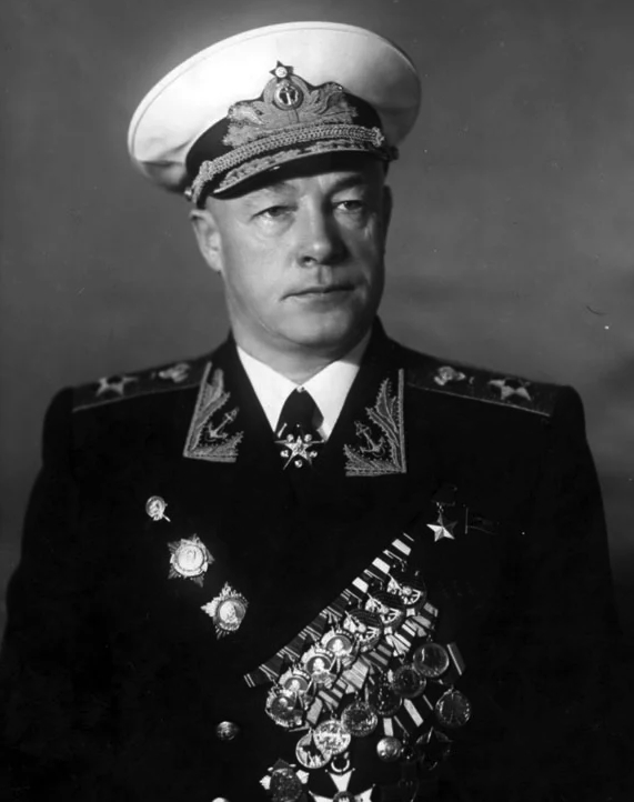 Николай Герасимович Кузнецов (1904 — 1974) — советский военачальник, Адмирал Флота Советского Союза